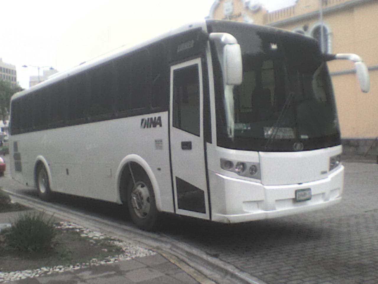 Un autobús urbano DINA modelo Linner, anteriormente llamado como HTQ 104 R, fueron una de los nuevos modelos que formaron parte de la reestructuración actual de la compañía.